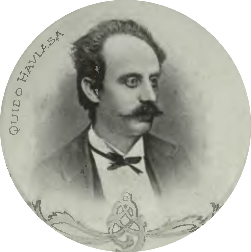 Portrét – Quido Havlasa (1839-1909), Český hudební skladatel.